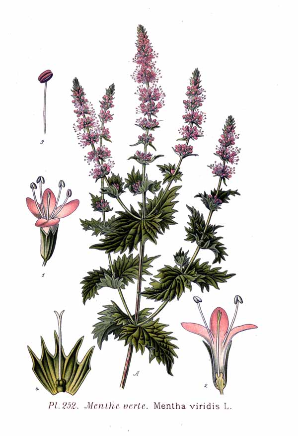 Mentha spicata subsp. spicata, syn. Mentha viridis (L.) L.